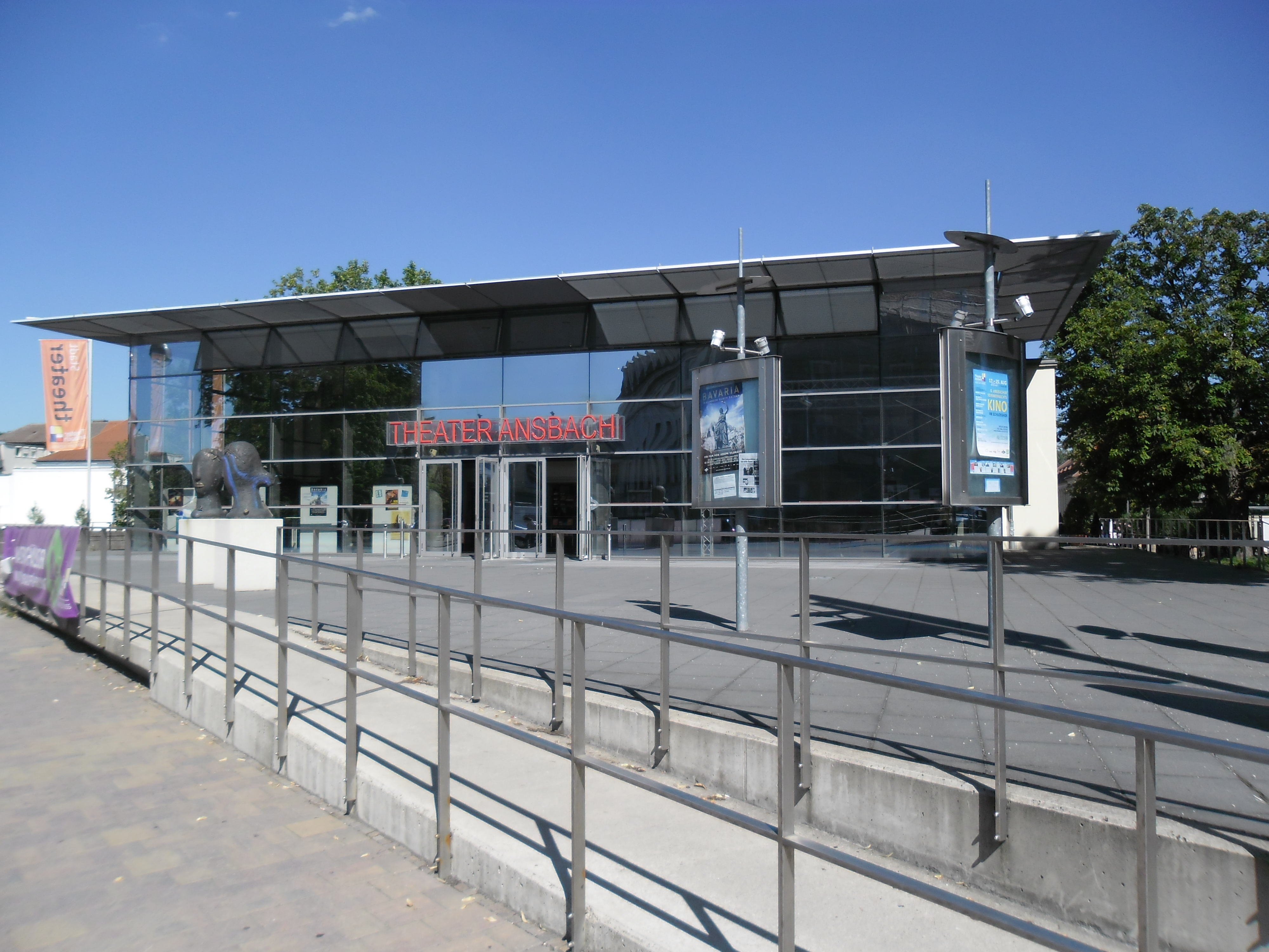 Das Theater Ansbach an der Promenade 29